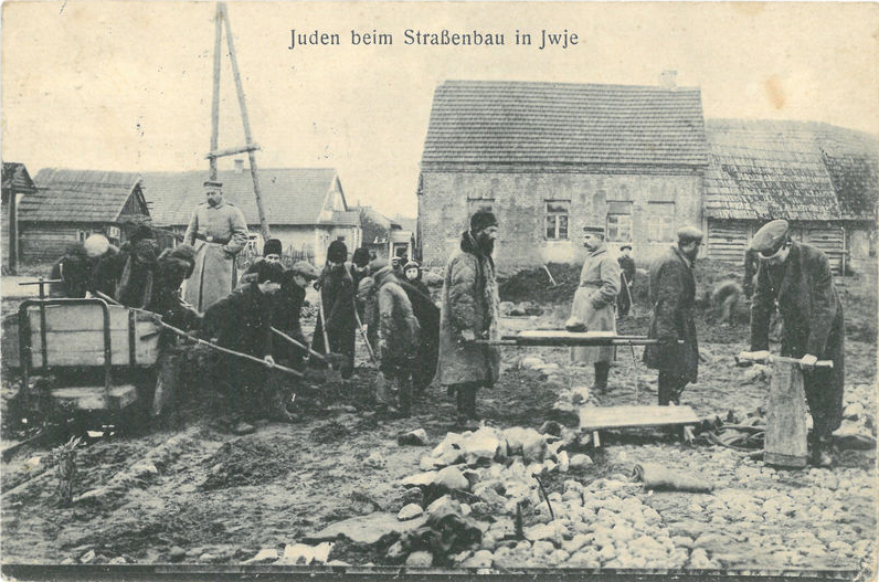 Беларуская (тарашкевіца): Іўе (Iŭje), пляц Рынак (plac Rynak). Жыды брукуюць пляц